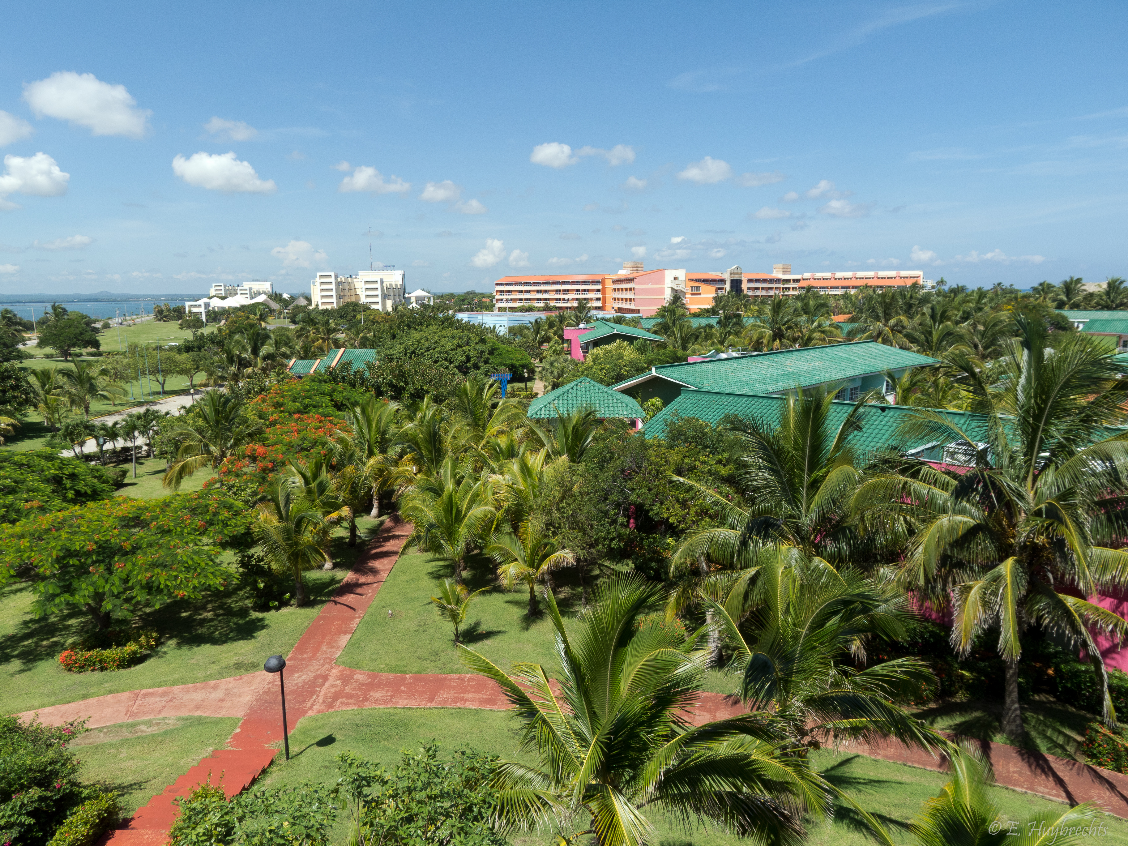 16 juillet 2011 (SAM_0369)